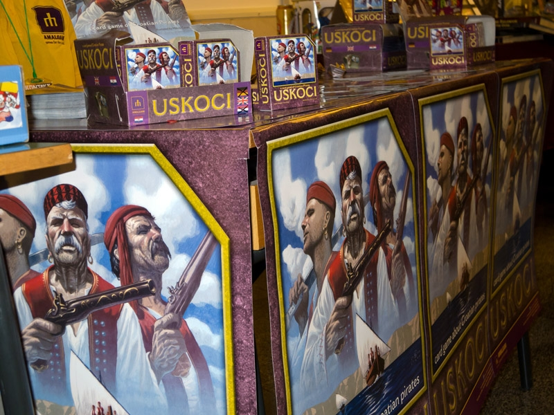 Konvencija Kontakt, koja je spojila 34. SFeraKon i 34. Eurocon u Zagrebu